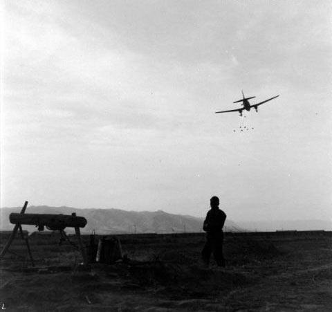 中华民国空军在给太原国军守军空投物资